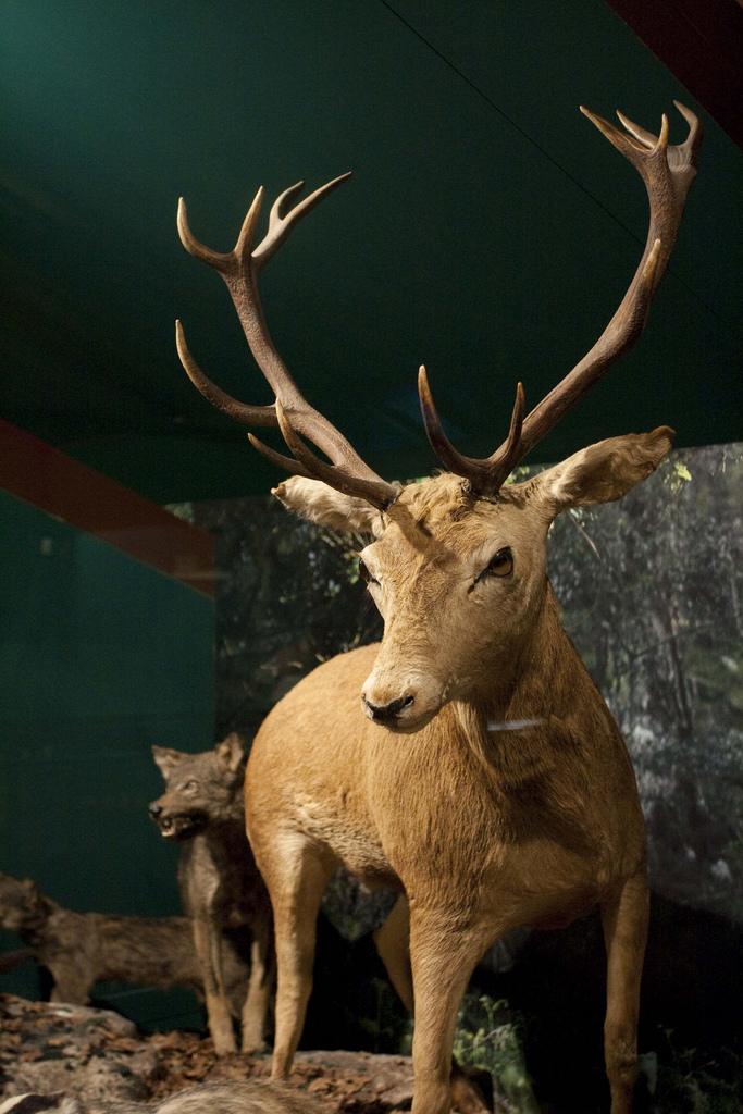 _MG_0241